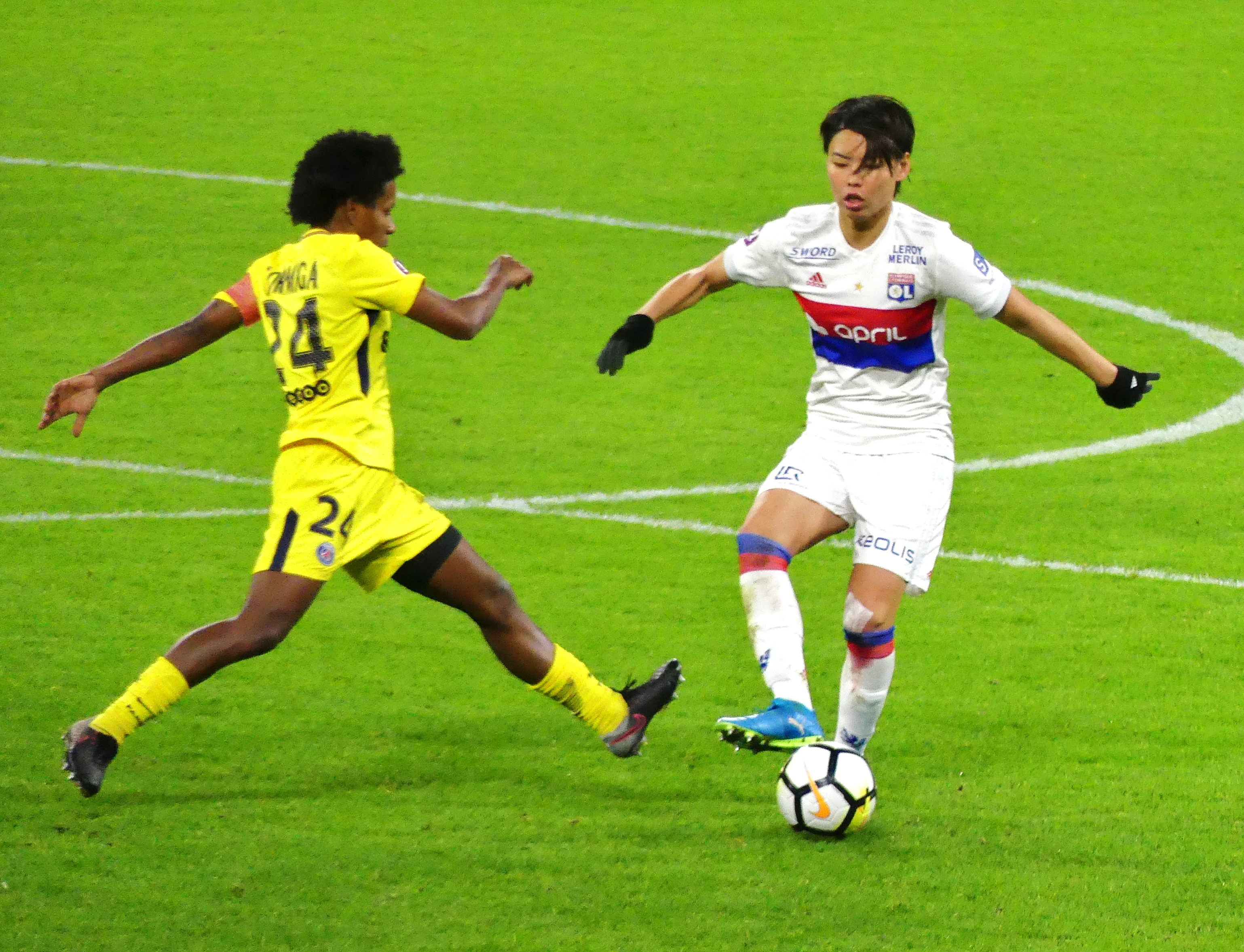 Saki Kumagai (熊谷紗希) au duel avec Formiga lors du match de l'Olympique lyonnais face au Paris Saint-Germain en championnat le 11 décembre 2017.